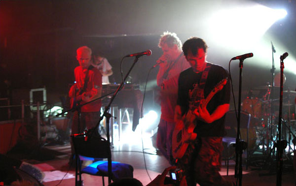 zdjęcie z pierwszego koncertu Buldoga. Więcej fotek na